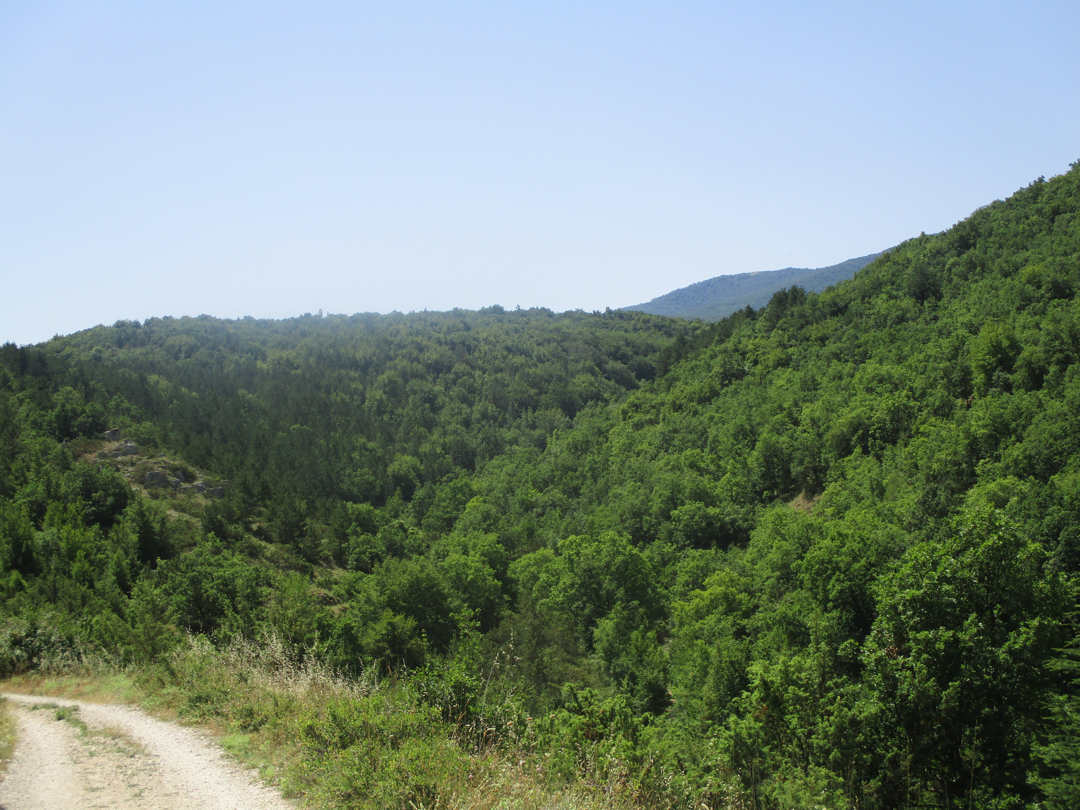 La Guardia